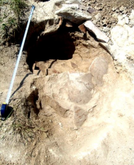 Դամբարան Երկու